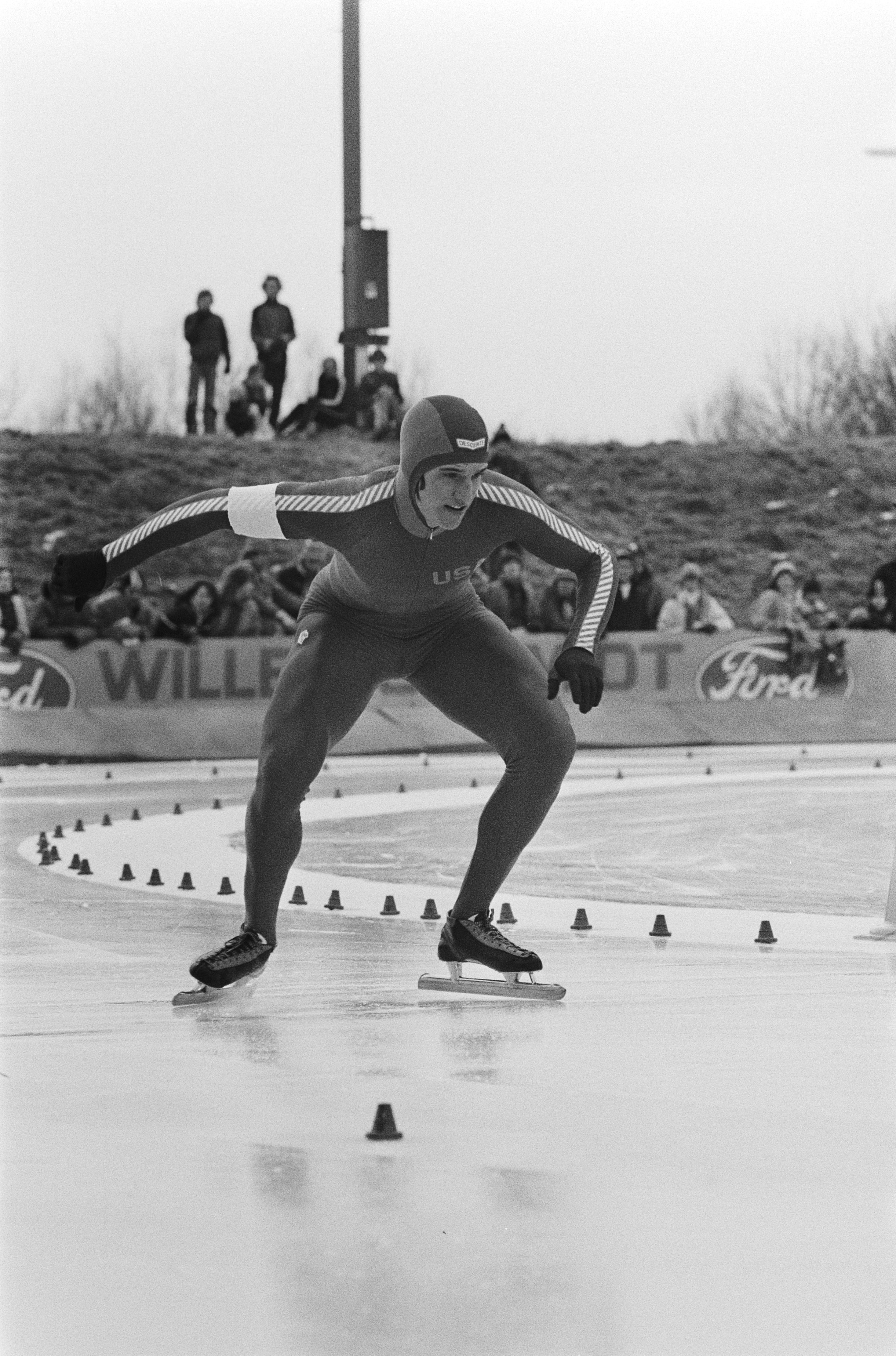 Collectie / Archief : Fotocollectie Anefo Reportage / Serie : Schaatswedstrijden om de Uniekaas Trofee in Alkmaar Beschrijving : Eric Heiden (Verenigde Staten) bij de start van zijn rit op de 500 meter Datum : 25 februari 1979 Locatie : Alkmaar, Noord-Holland Trefwoorden : schaatsen, sport Persoonsnaam : Heiden, Eric Fotograaf : Suyk, Koen / Anefo Auteursrechthebbende : Nationaal Archief Materiaalsoort : Negatief (zwart/wit) Nummer archiefinventaris : bekijk toegang 2.24.01.05 Bestanddeelnummer : 930-1361